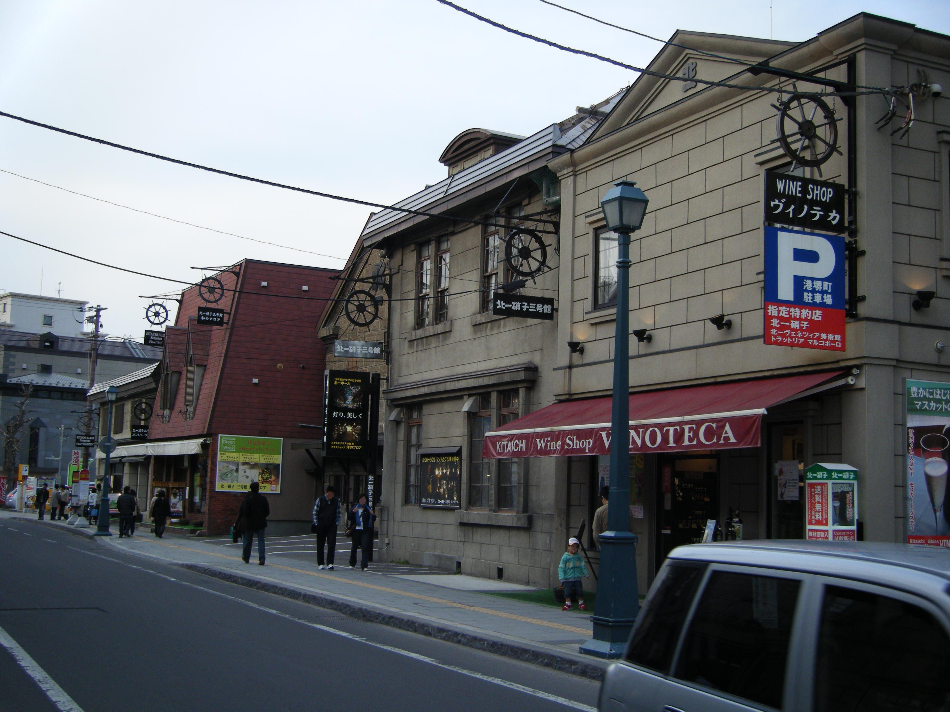 北一硝子三号館・カントリー館外観